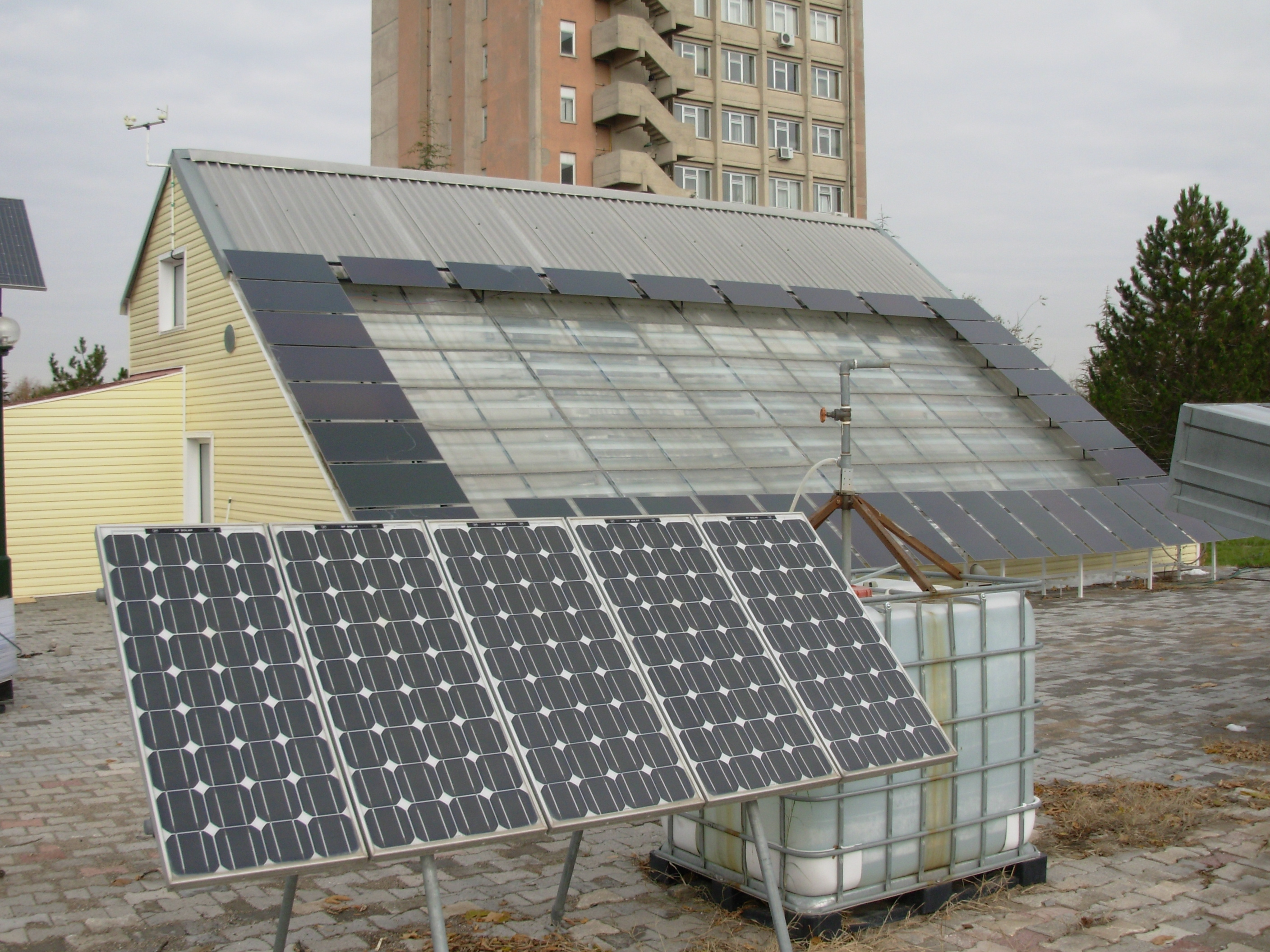 Hacettepe Üniversitesi YETAM ın merkezi